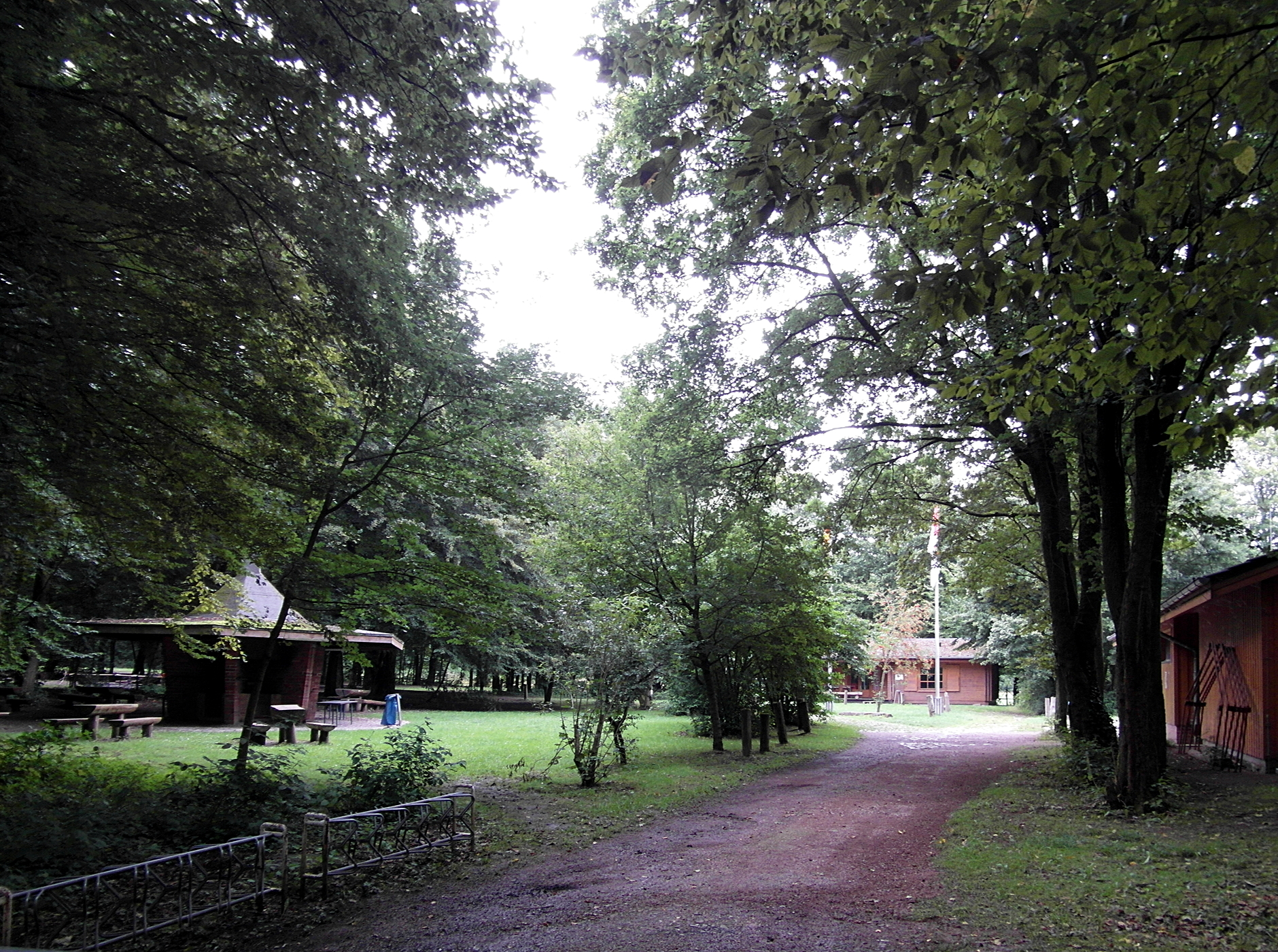 Nördlich der Wennigser Ortslage Waldkaters liegen am Deisterrand die Finnhütten, ein Ferienlager der Stadt Hannover